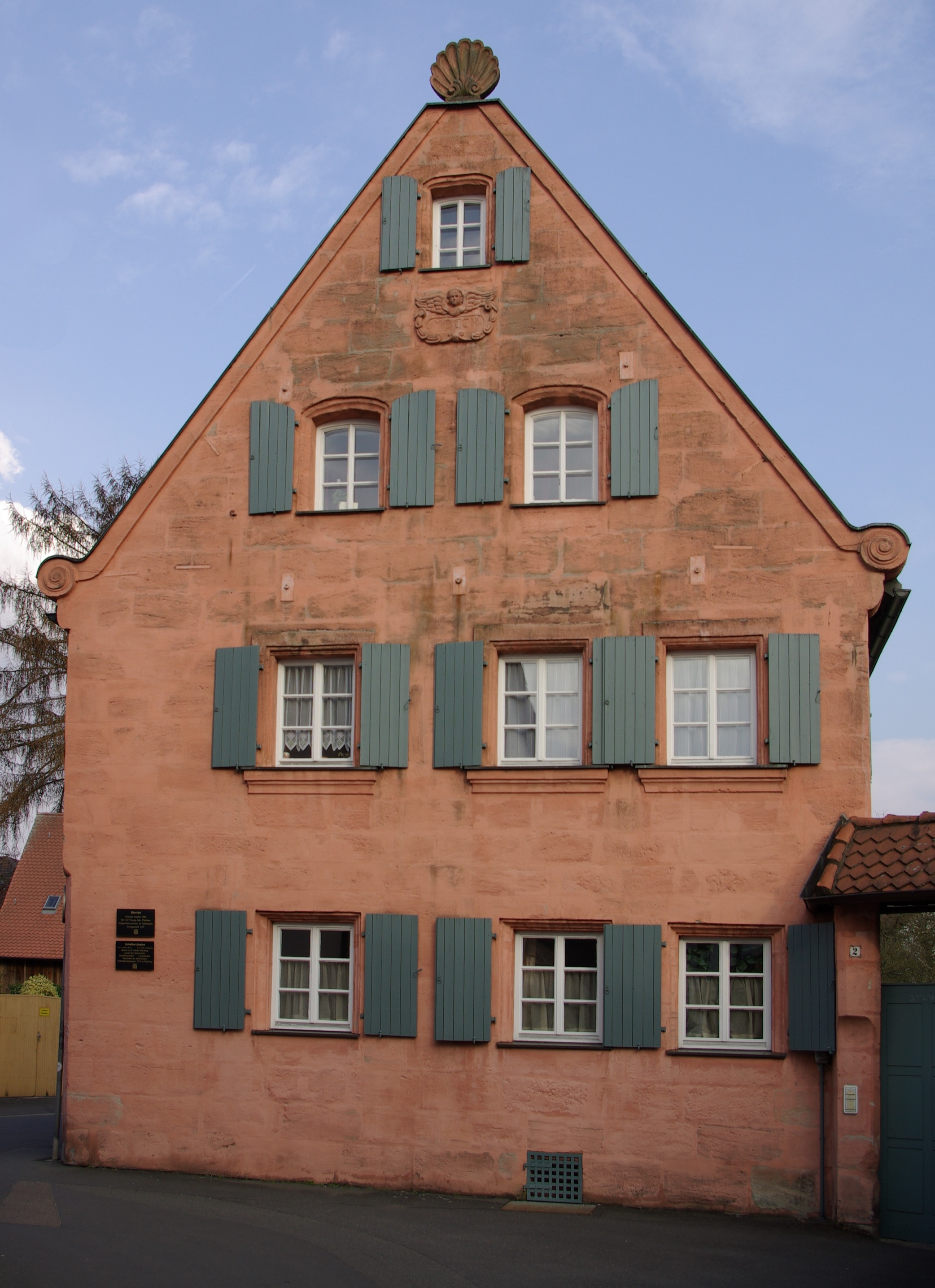 Pfarrhof im Erlanger Stadtteil Bruck, Friedhofstraße 2 (früher Haus Nr. 33).